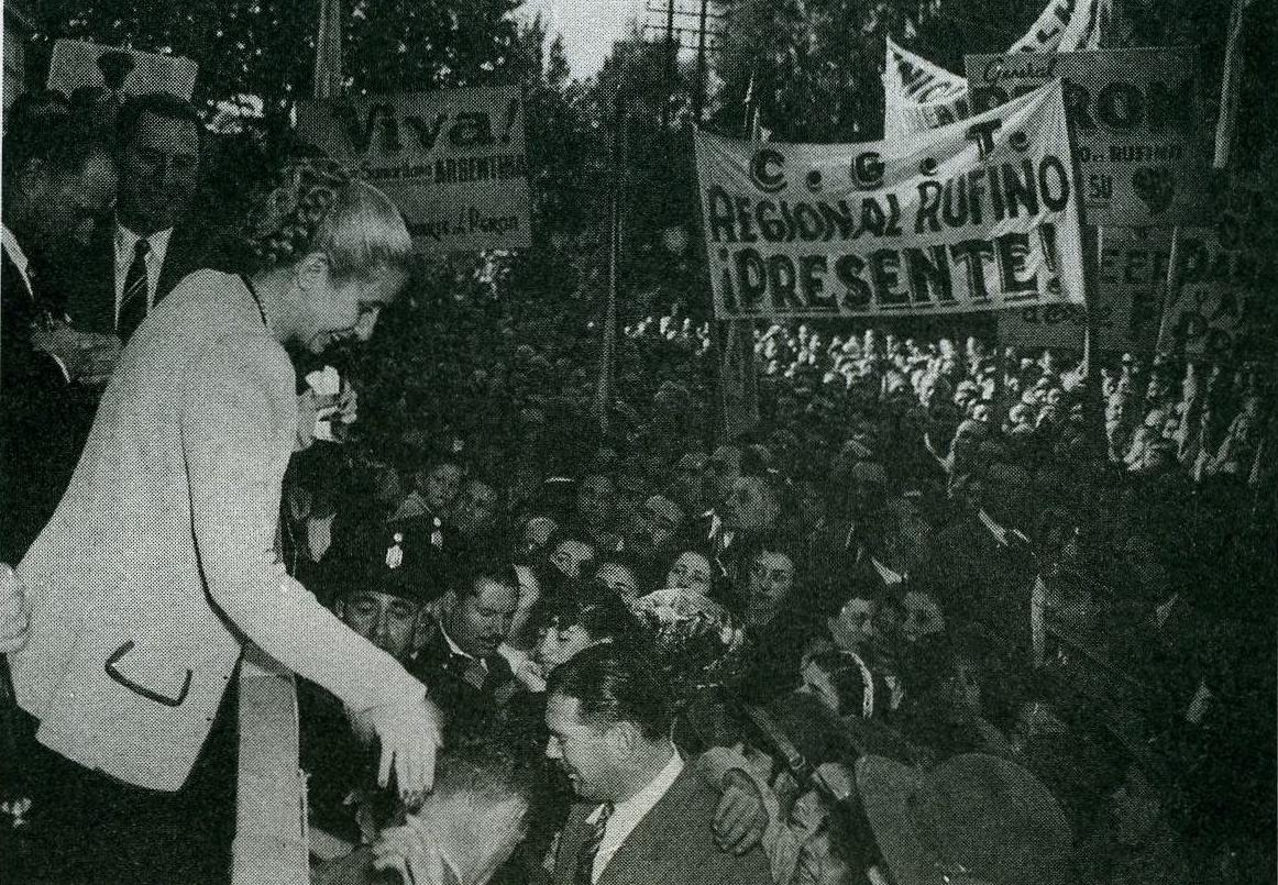 Eva Duarte (Evita) en una manifestacion.